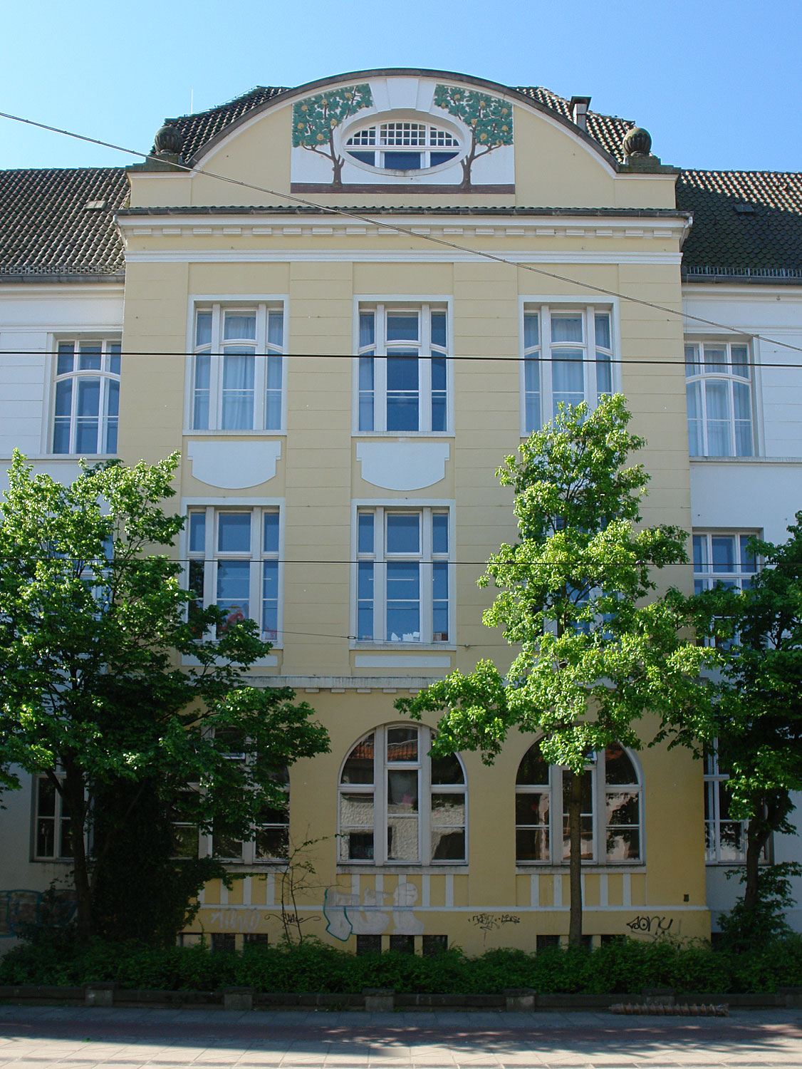 Schule Auf der Hohwisch 61, Bremen-Hemelingen.Erbaut 1903. Architekt: Hogo Weber Das abgebildete Objekt ist ein geschütztes Kulturdenkmal in der Freien Hansestadt Bremen, mit der Nr. 0096 beim Landesamt für Denkmalpflege registriert.